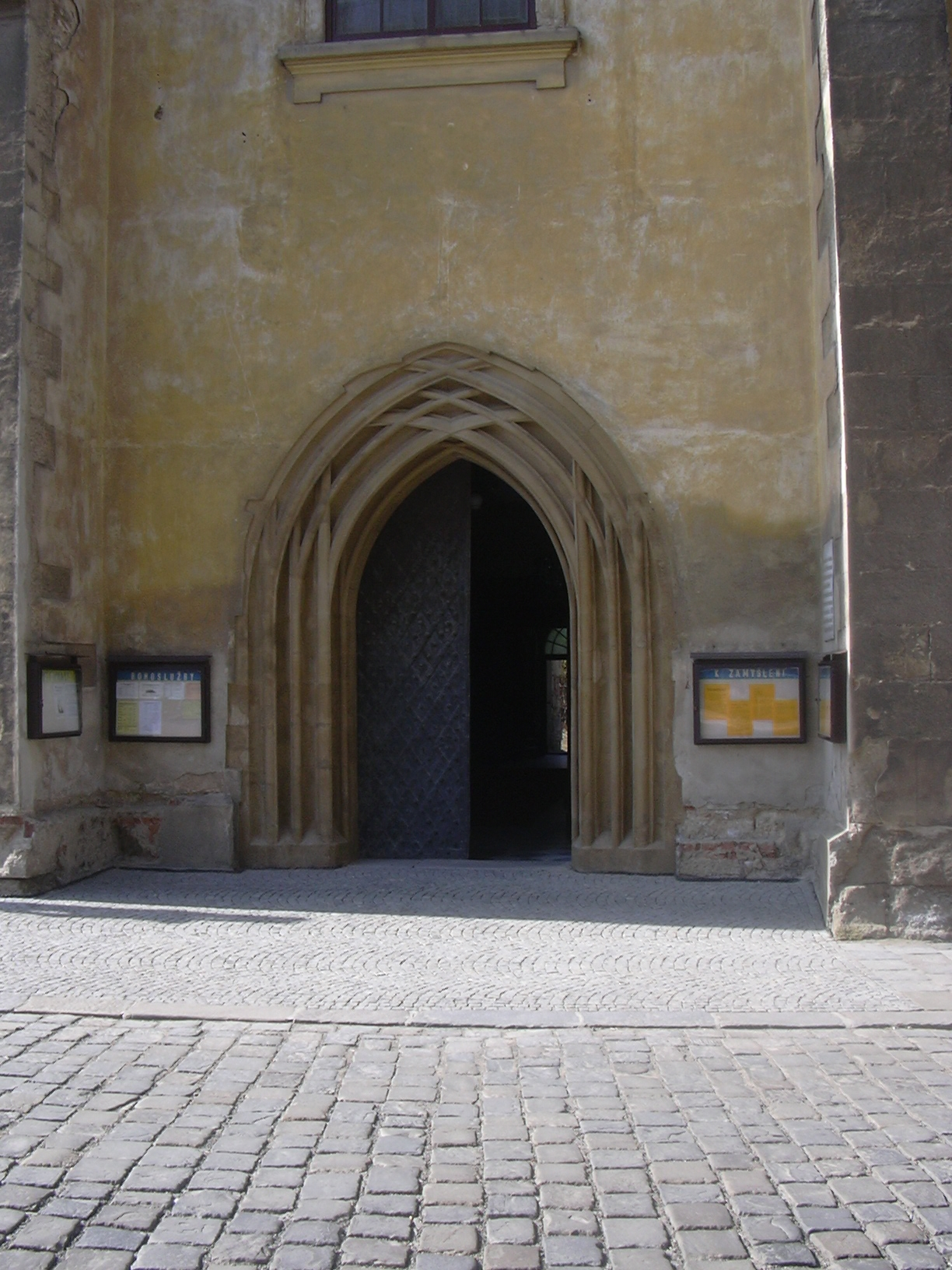 Kostel Nanebevzetí Panny Marie portál(Vyškov- czech republic)